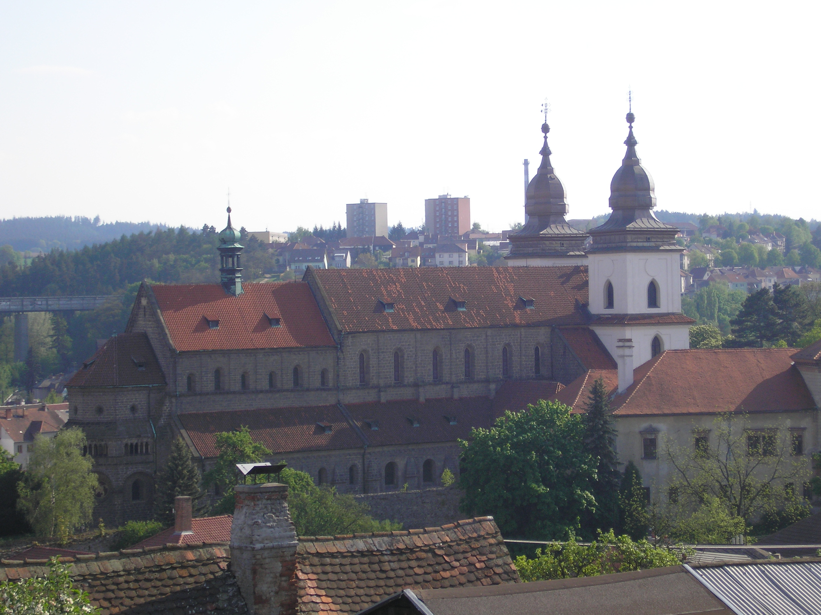 Třebíčská bazilika přiléhající k zámku zapsaná na seznamu památek UNESCO